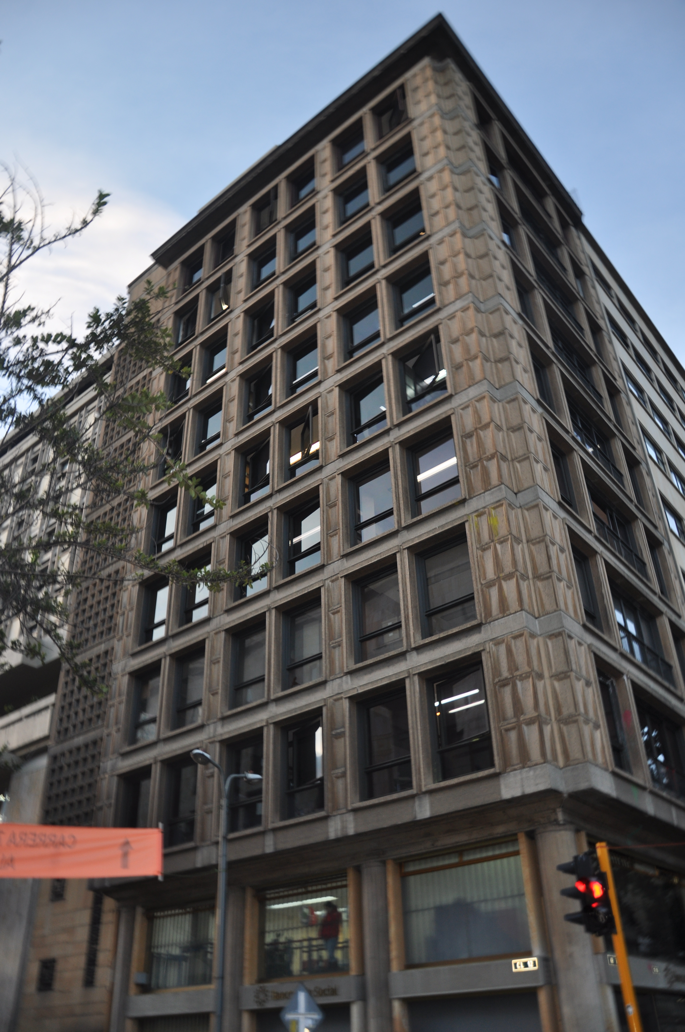 Edificio Quintana, vista desde la carrera séptima.